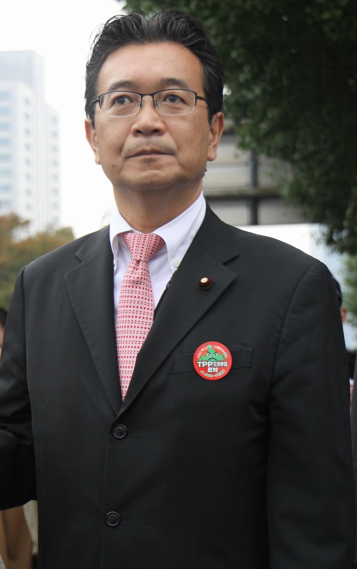 川内博史。TPPを考える国民会議主催。TPP交渉参加に反対するデモにて撮影。 Hiroshi Kawauchi